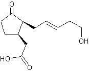 Структурная формула химического вещества